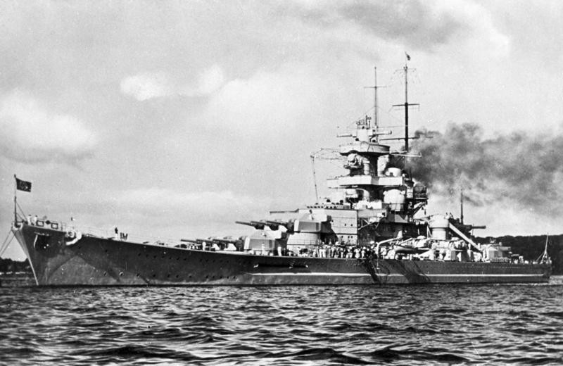 Schlachtschiff "Gneisenau" Schlachtschiff "Gneisenau"